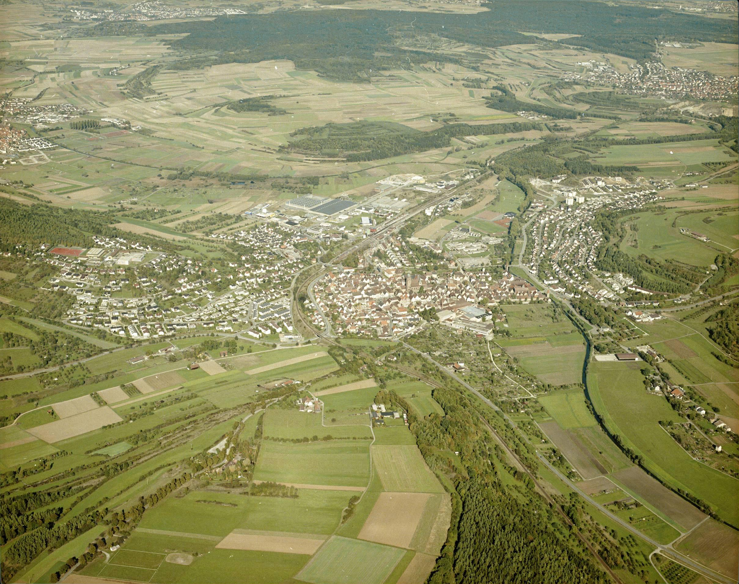 Luftbild von Weil der Stadt - Staatsarchiv Sigmaringen - Archivalieneinheit N 1/96 T 1 Nr. 507